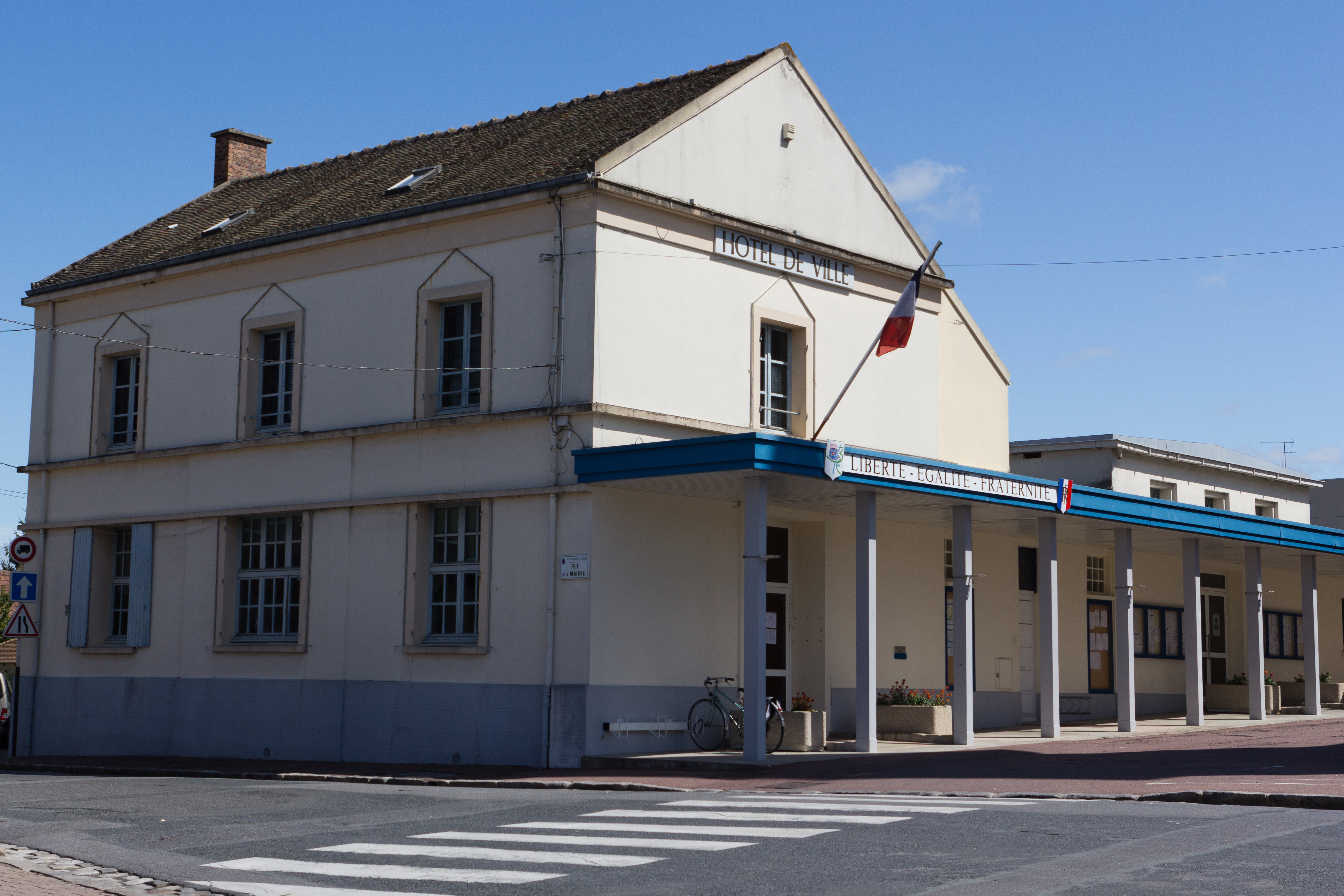 Mairie de Ballancourt-sur-Essonne, Ballancourt-sur-Essonne, département de L'Essonne, France